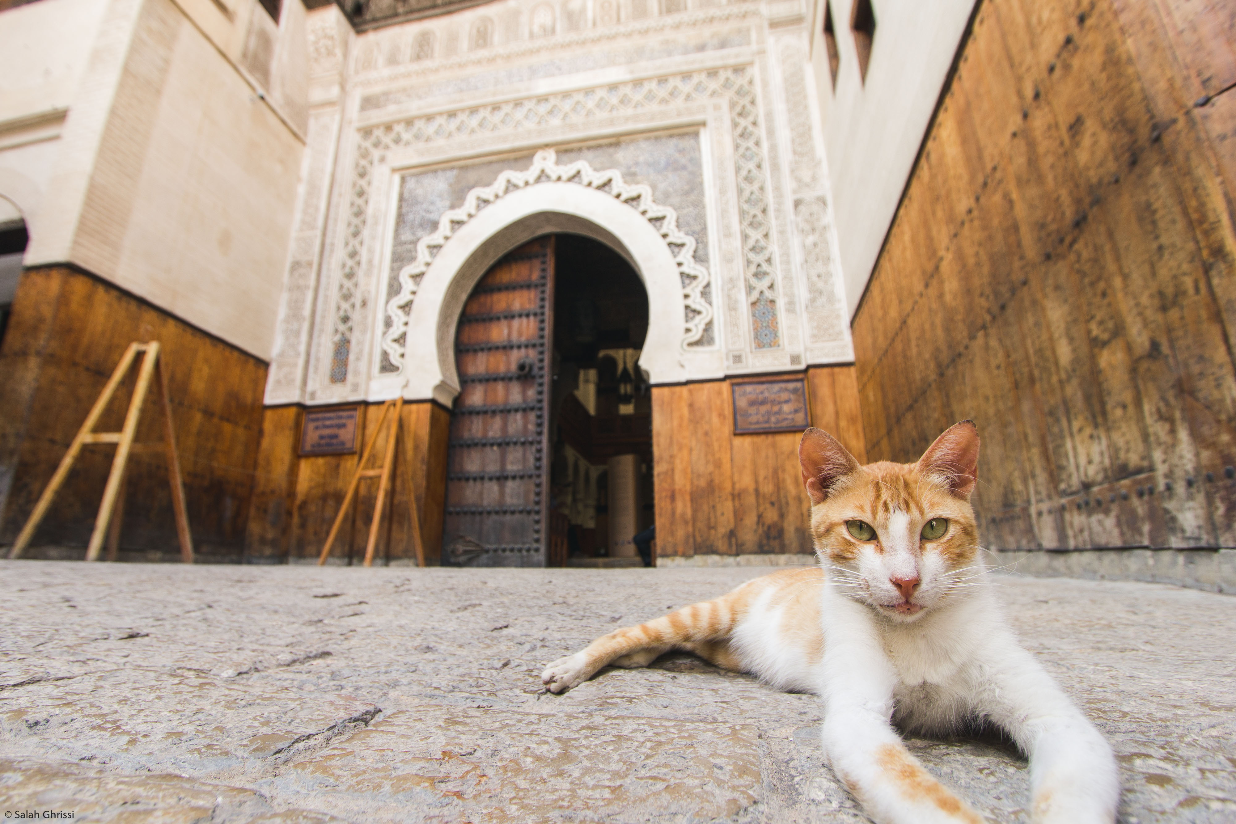 Chat au repos devant la porte du Musée Nejjarîn des Arts et Métiers du bois